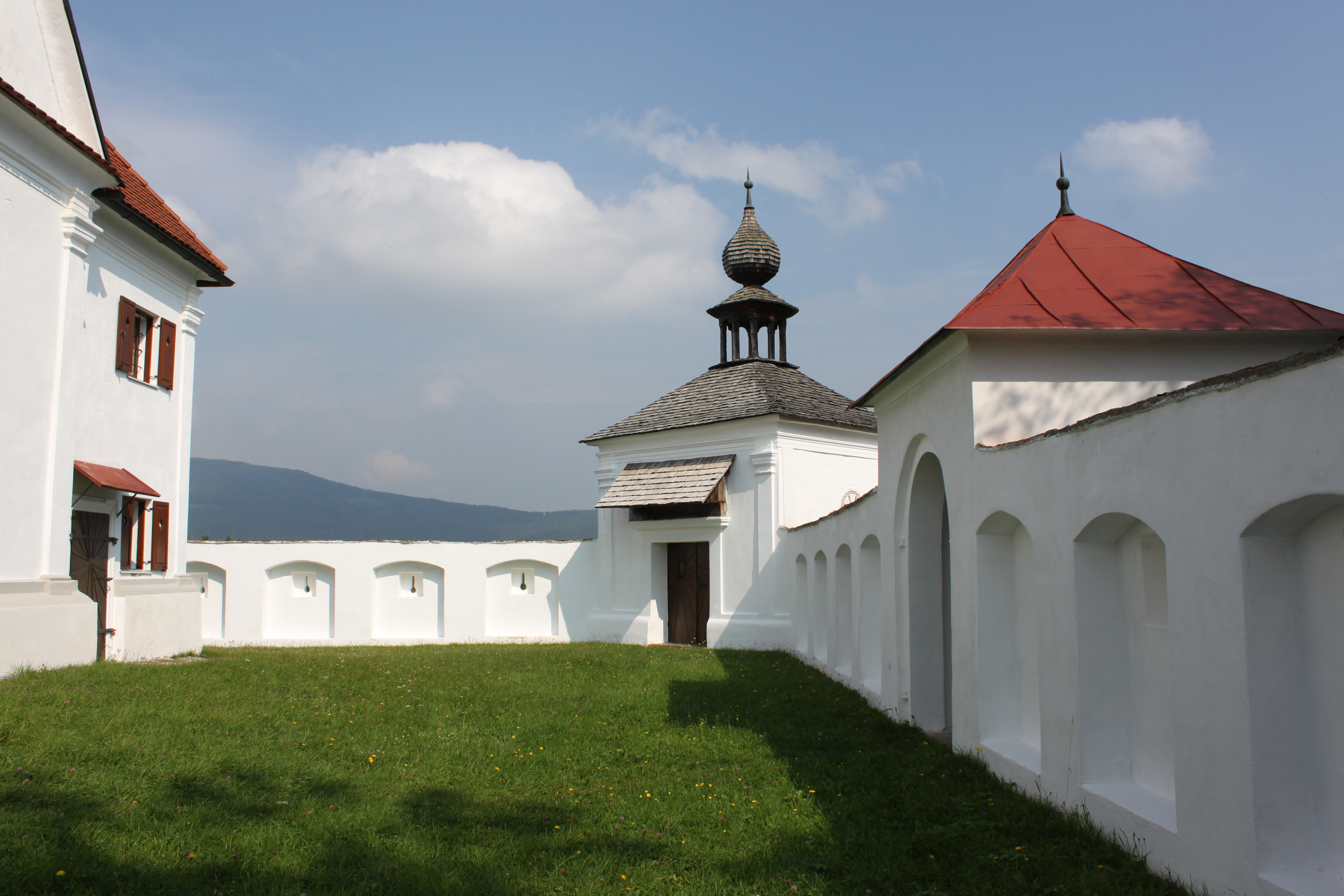 Maria Loreto (Gutenberg), Innenhof, links Sakristei der Kirche, mittig ostseitige Initienkapelle, rechts gedeckter Abgang zum Friedhof